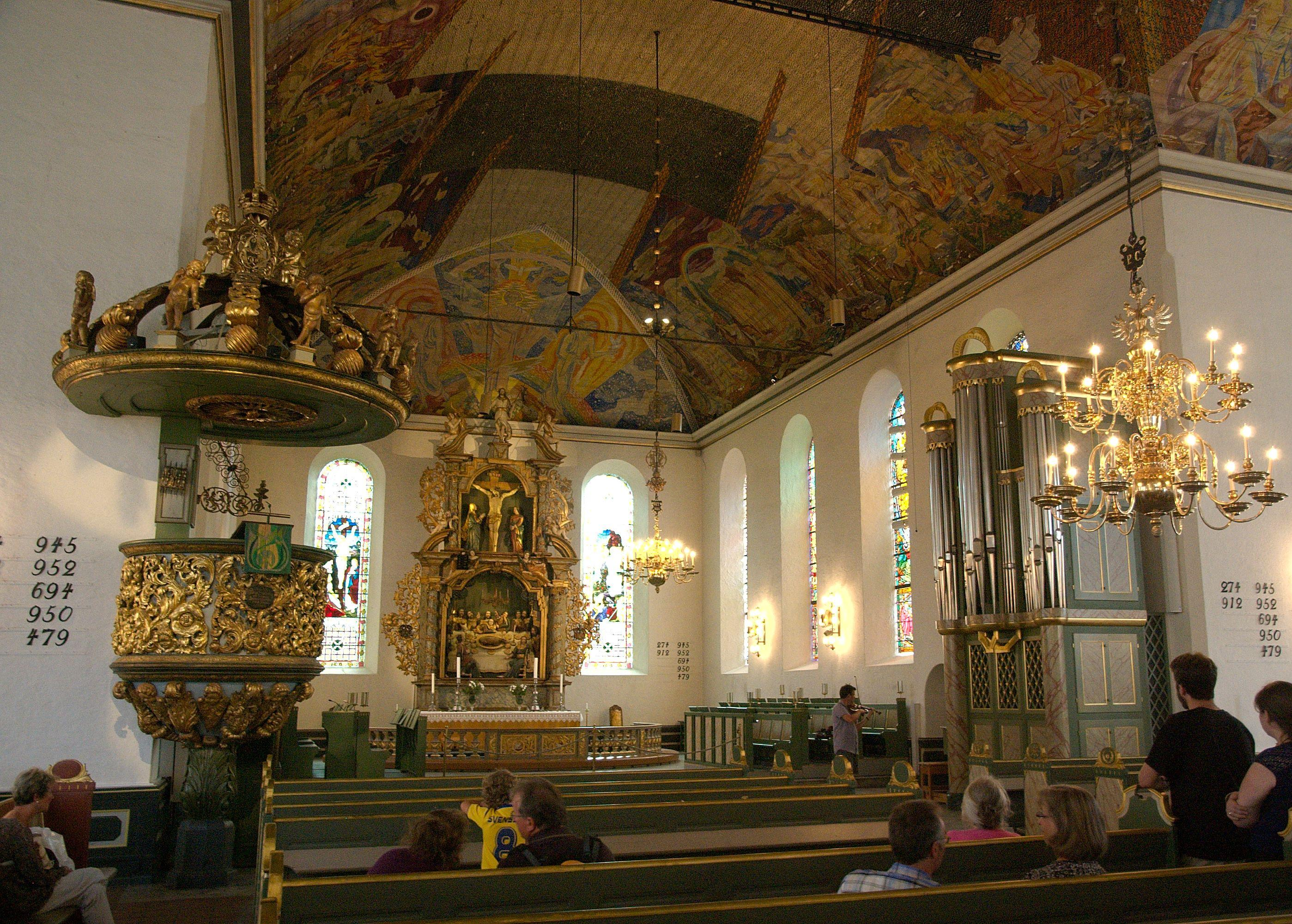 Oslo Domkirke sett mot altertavlen.